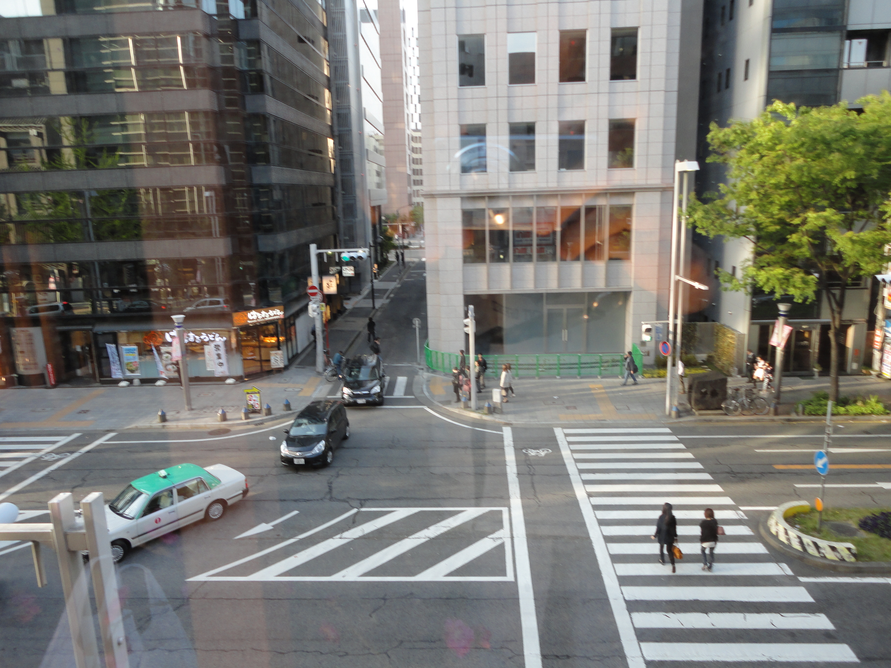 名古屋中村区名駅 広小路通